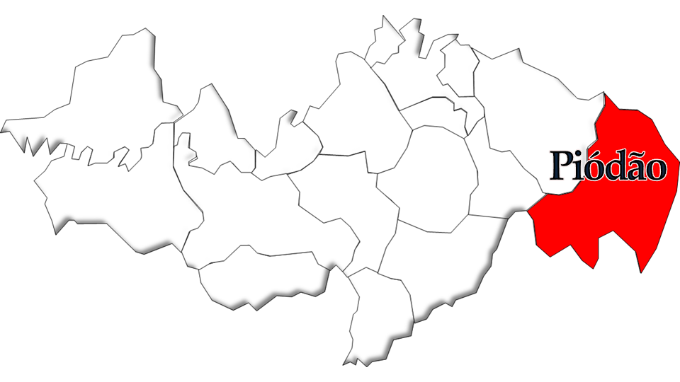 População